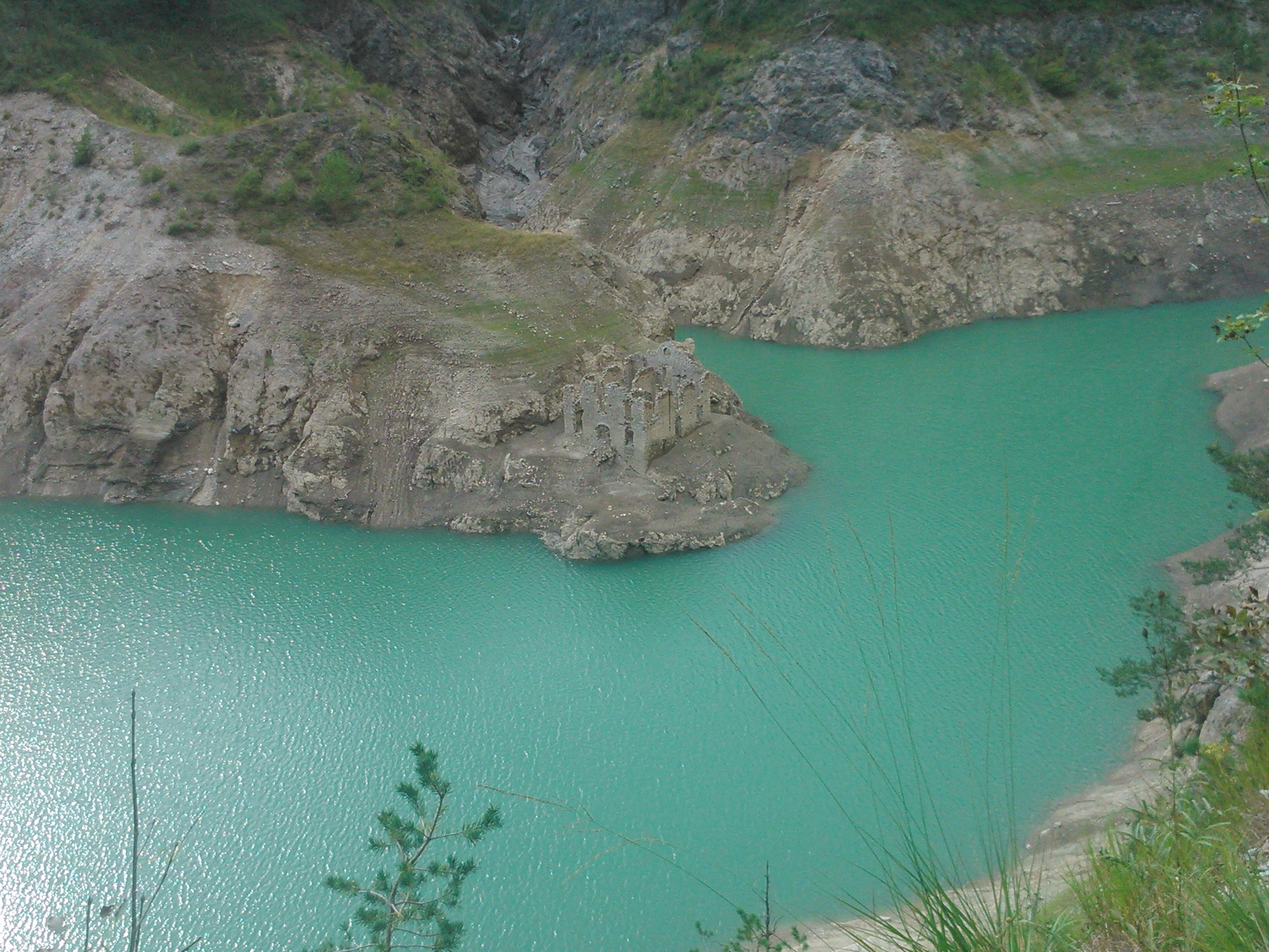 ex caserma della Regia Guardia di Finanza della Patoàla nel comune di Gargnano, provincia di Brescia, Italia